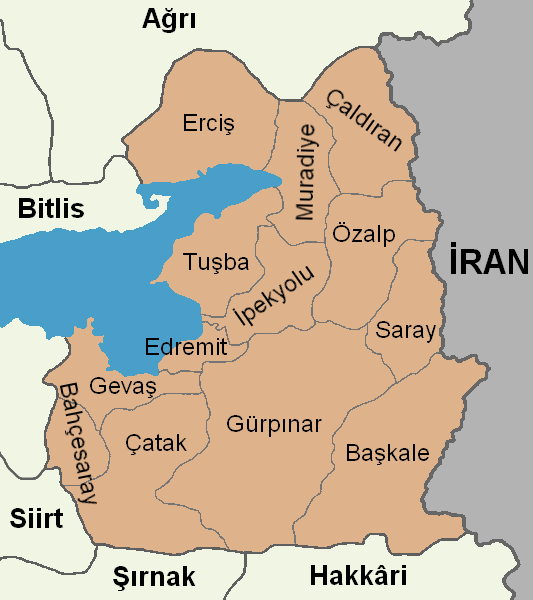 Van'ın ilçelerini gösteren harita